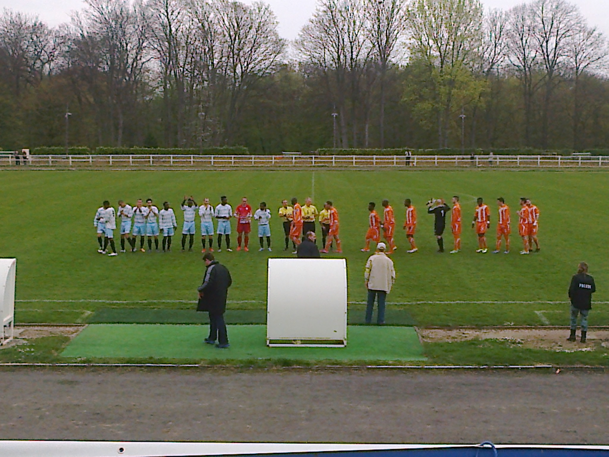 Présentation des équipes lors du match AC Boulogne-Billancourt - Racing CF du 30 mars 2014